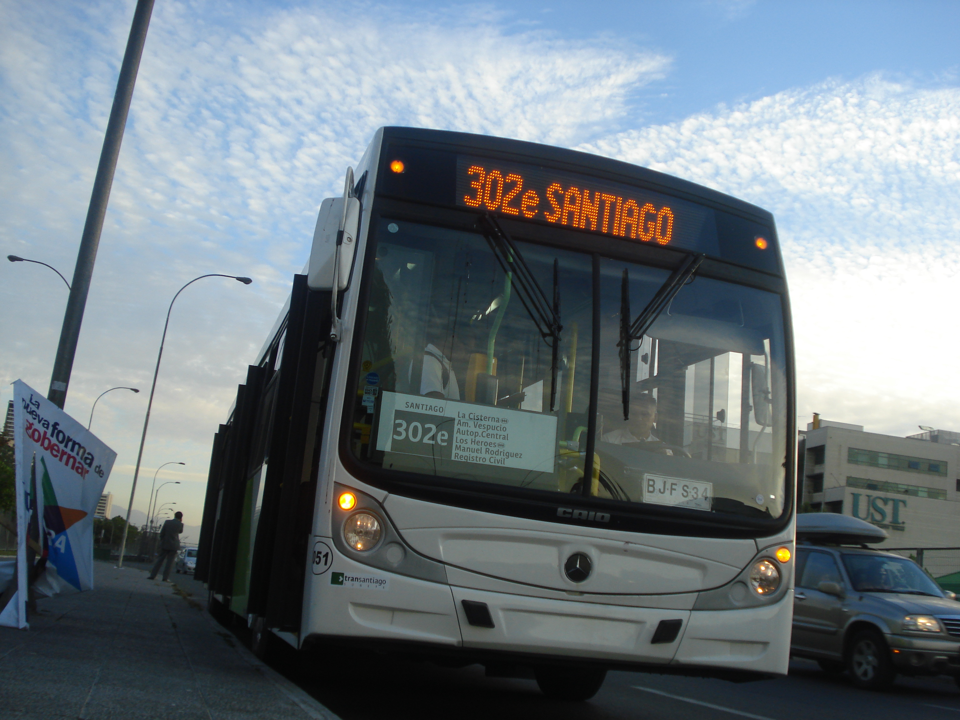 Servicio 302e que usa Autopista Panamericana para llegar al centro de Santiago.